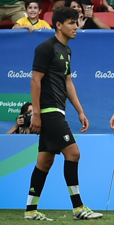 Estádio Nacional de Brasília Mané Garrincha, Brasília, DF, Brasil, 10/8/2016 Foto: Andre Borges/Agência Brasília. O time da Coréia do Sul classificou-se para a próxima fase do torneio de futebol masculino da Olimpíada com uma vitória por 1 a 0 contra o México. Kwon Chang-hoon marcou o gol da vitória sul-coreana aos 32 minutos do segundo tempo.